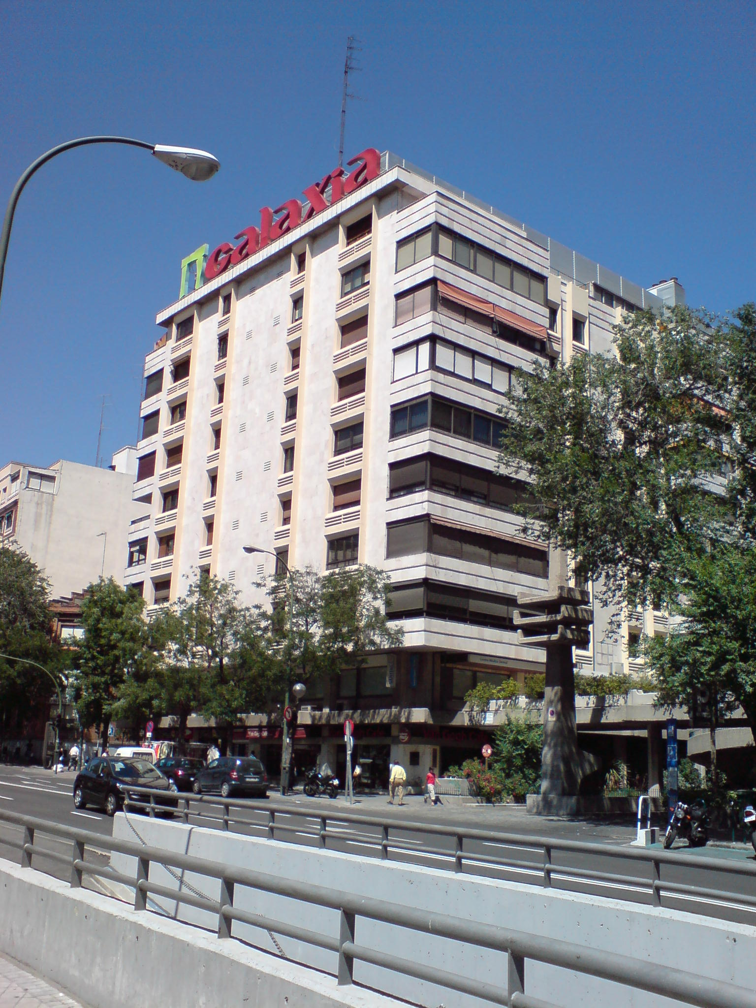 Edificio Galaxia